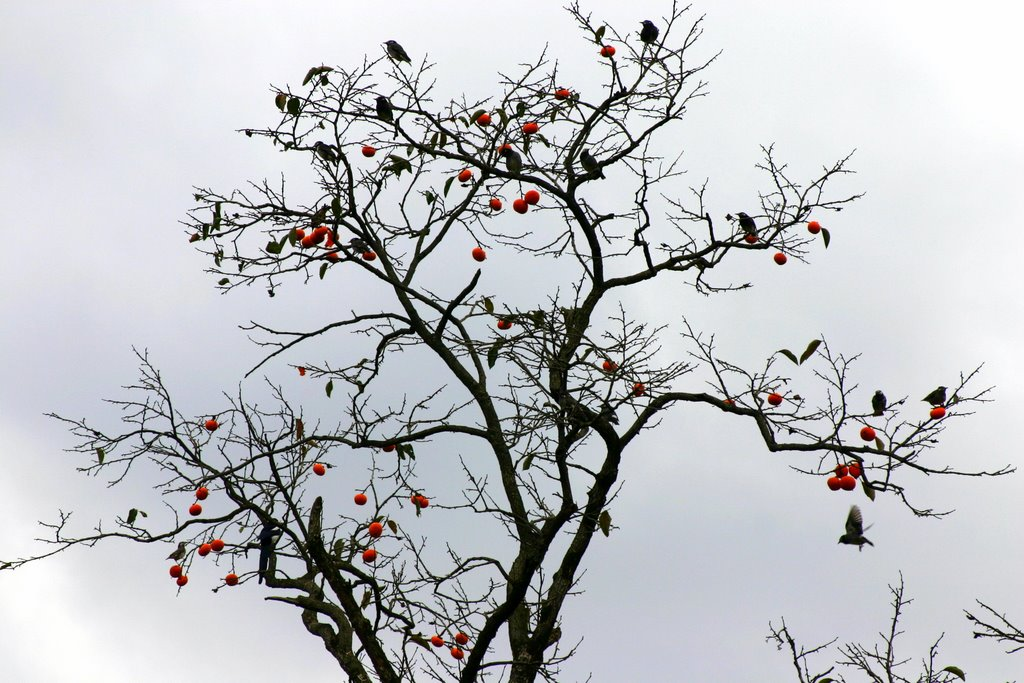 Hahoe Folk Village in Andong, Gyeongsangbuk-do, South Korea.